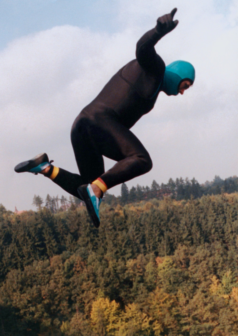 Rudolf Bok při svém rekordním skoku do Orlické přehrady ze Žďákovského mostu